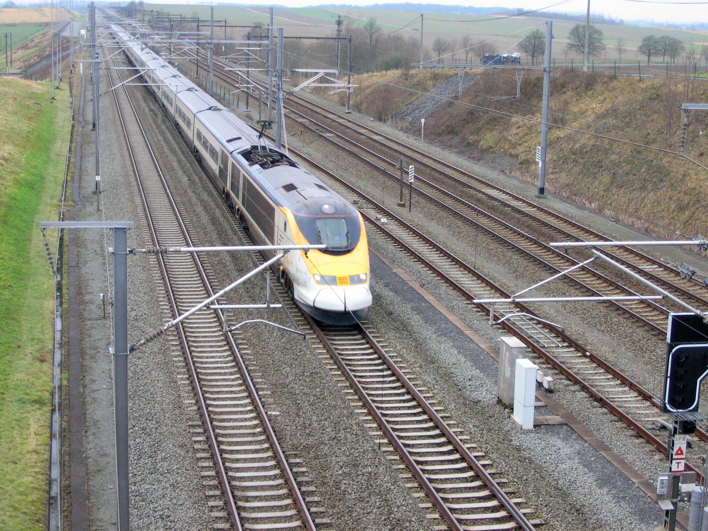 Eurostar en direction de Bruxelles-Midi.